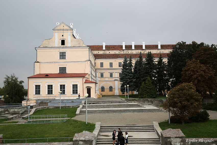 Пінск. Кляштар францысканцаў